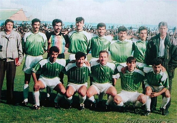 بازیکنان ماشین سازی به همراه ناصر حجازی، مربی تیم؛ در لیگ آزادگان 1373، ورزشگاه باغشمال.